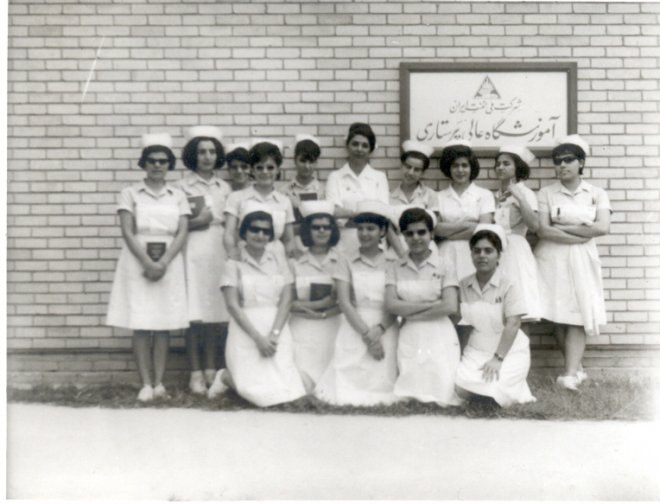 Higher Institute of Nursing Oil Company in Abadan